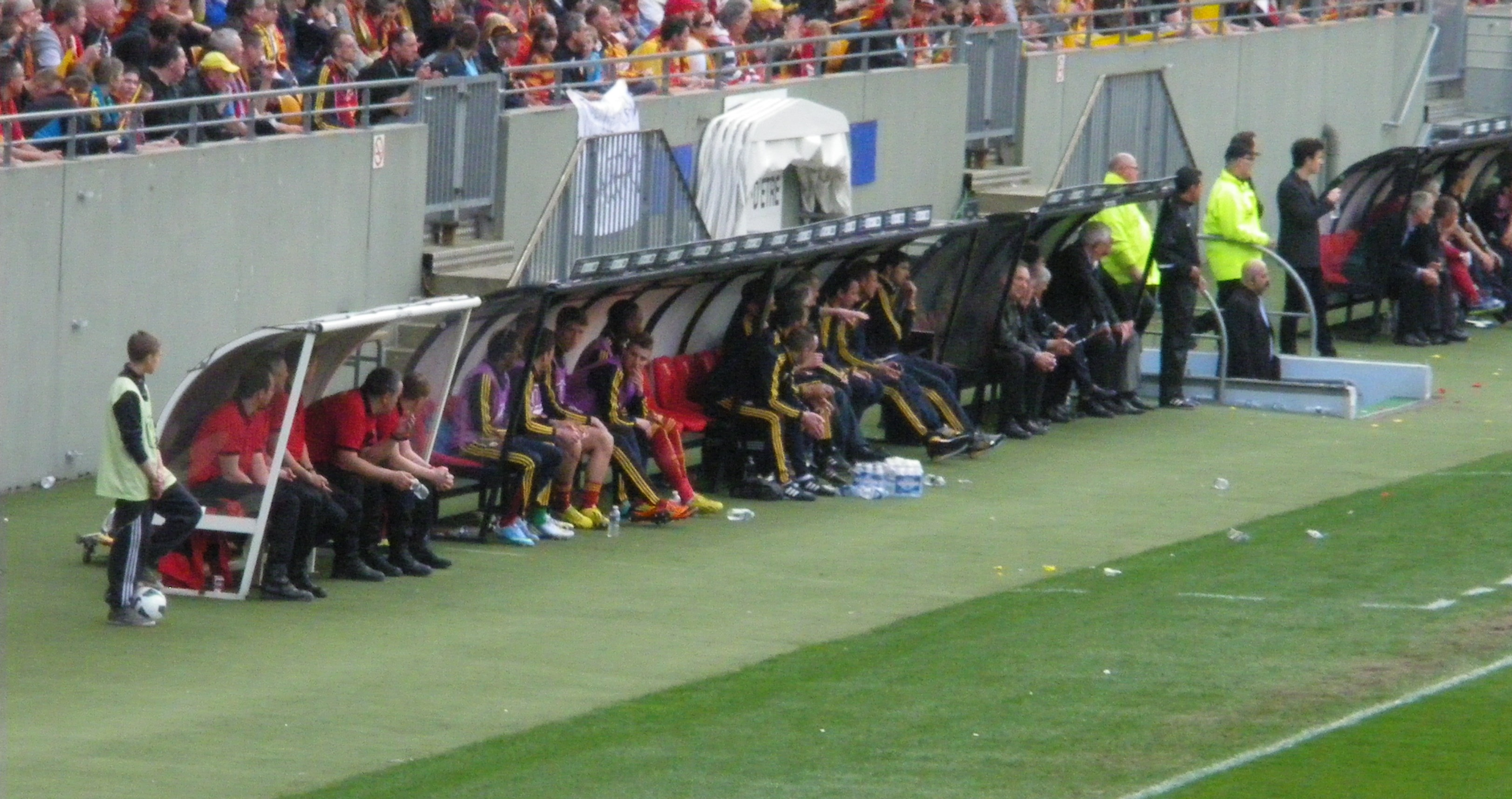 Vue du banc de touche du Racing Club de Lens lors du match Lens-Bordeaux de la Coupe de France 2012-2013.